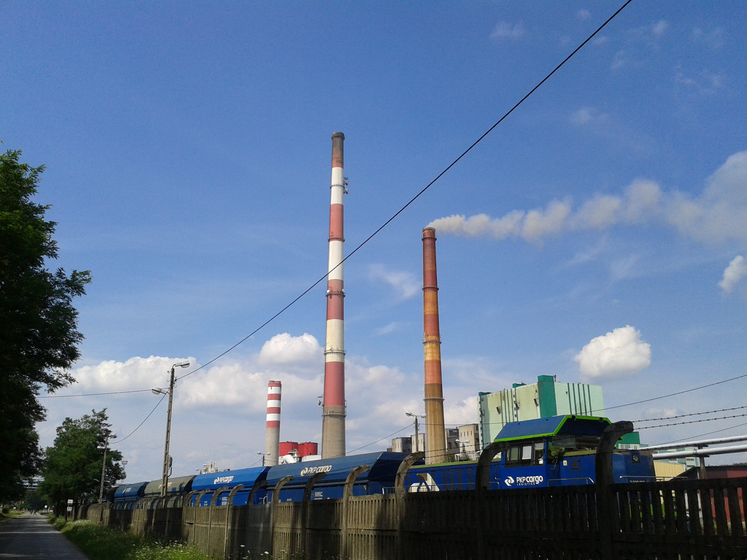 Elektrownia Siersza